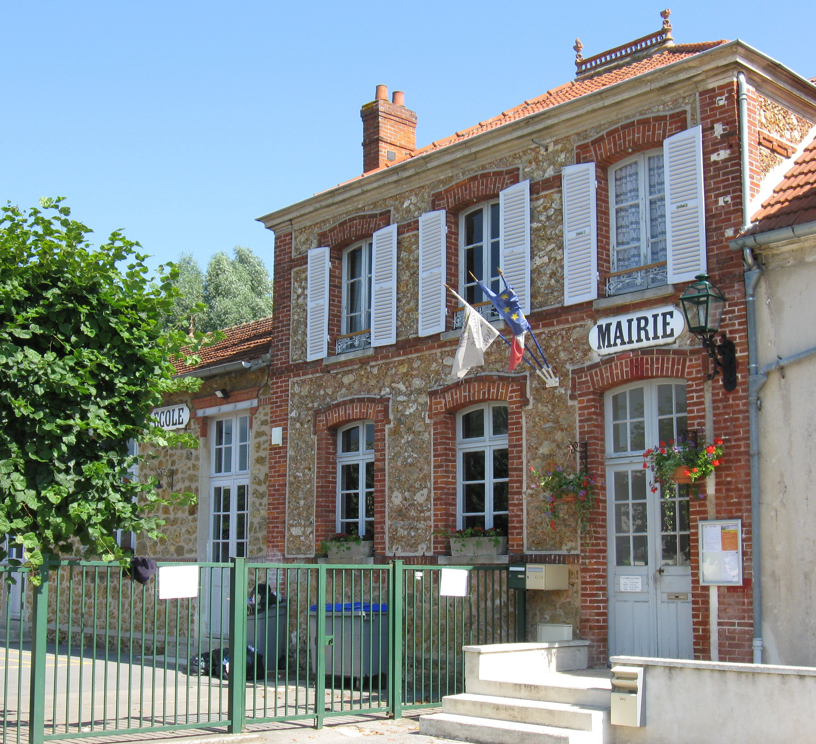 Mairie de Changis-sur-Marne (département de la Seine-et-Marne, région Île-de-France).